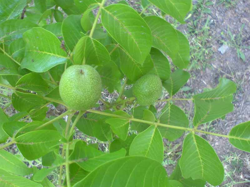 سرمشک